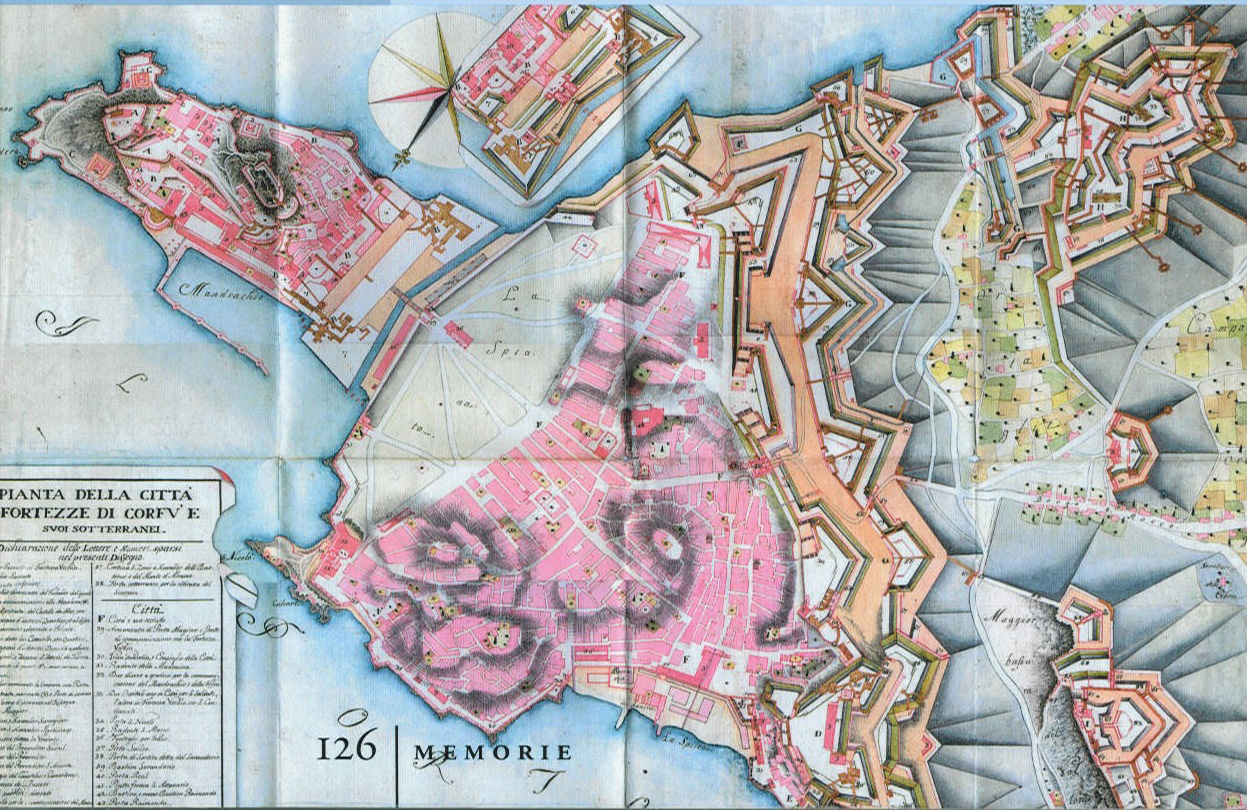 Χάρτης της Πόλης Κέρκυρας και τα φρούριά της.